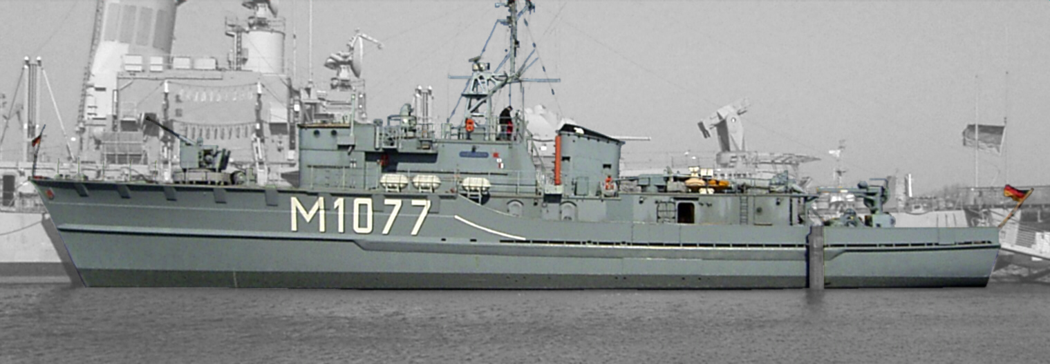 Deutsche Bundesmarine, Minensuchboot M1077 "Weilheim" der Lindau-Klasse (320 später 331), ausgestellt im Deutschen Marinemuseum Wilhelmshaven (im Hintergrund Zerstörer "Mölders"). Bild nachbearbeitet: Hintergrund aufgehellt und entfärbt.